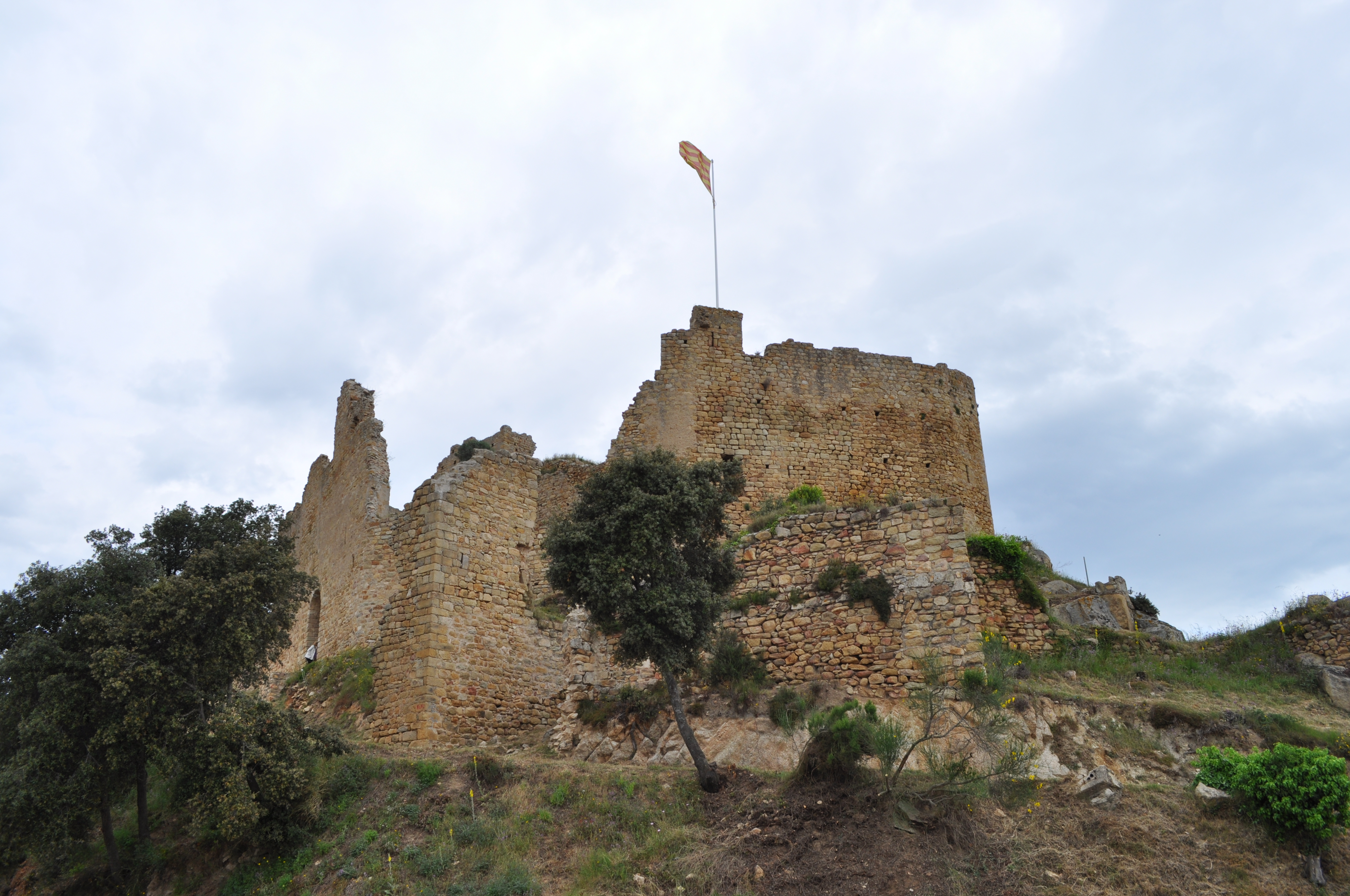 Burgruine von Parafolls